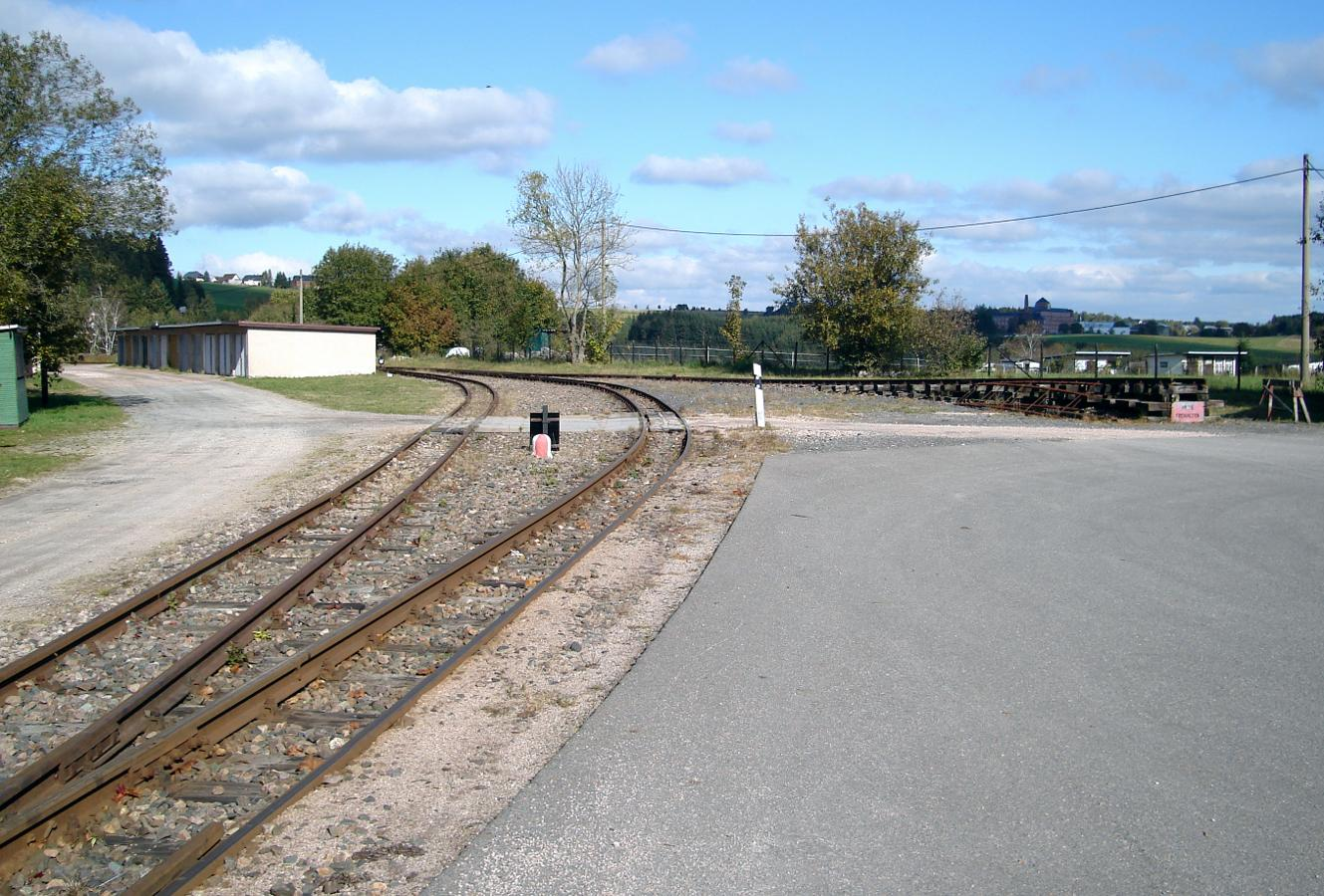 Haltestelle Neuheide der Schmalspurbahn Wilkau-Haßlau–Carlsfeld